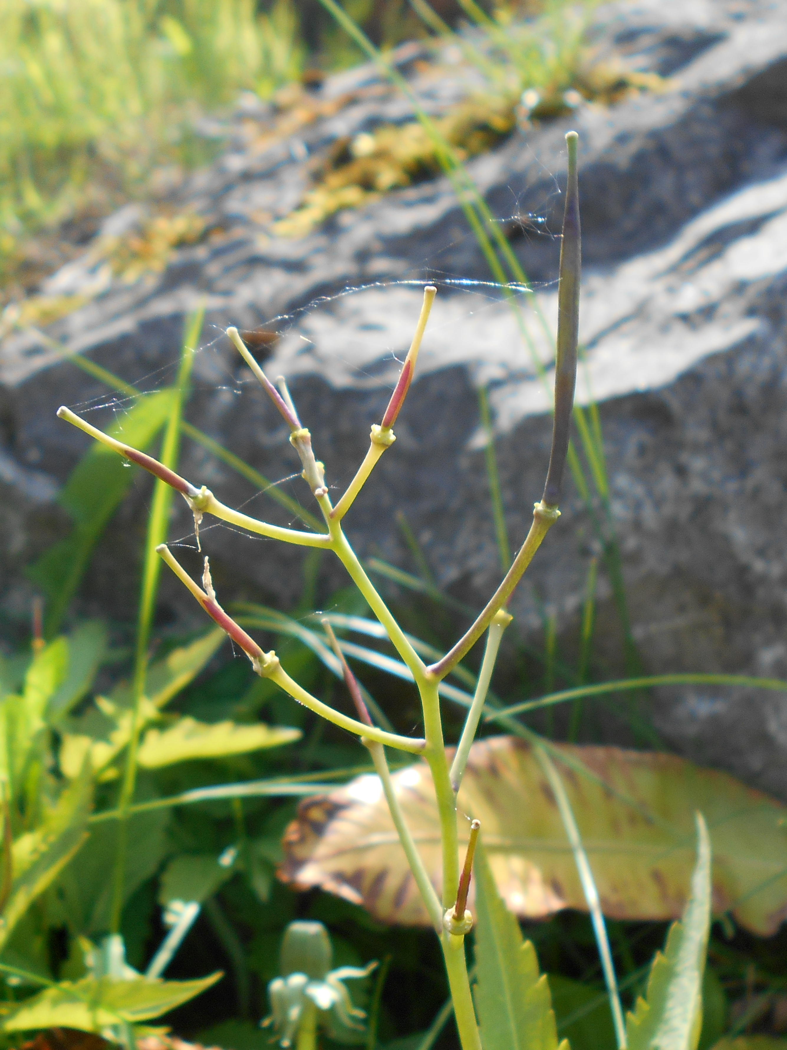 Żywiec gruczołowaty (Dentaria glandulosa), Ogród Botaniczny PAN w Warszawie.